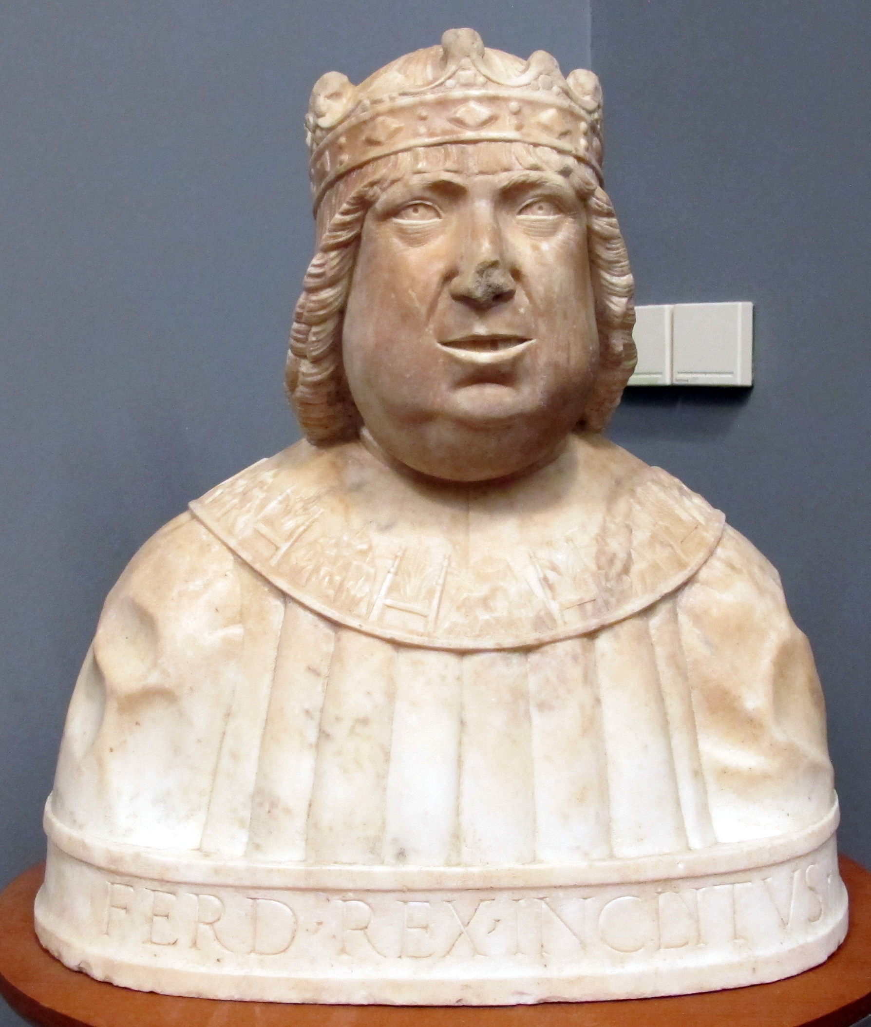 Galleria Napoletana (Museo di Capodimonte)